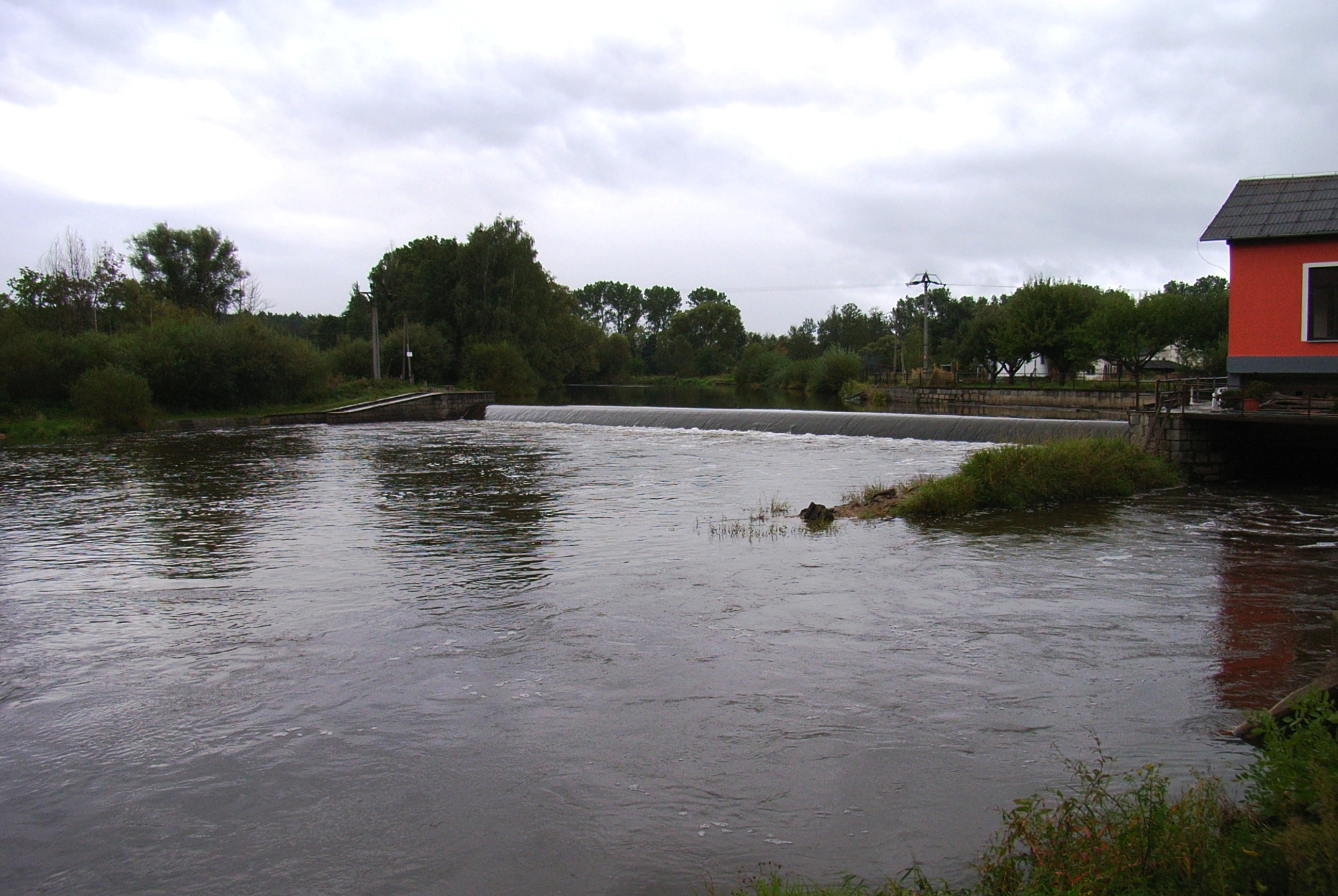 Jez v Dráchově při zvýšené hladině